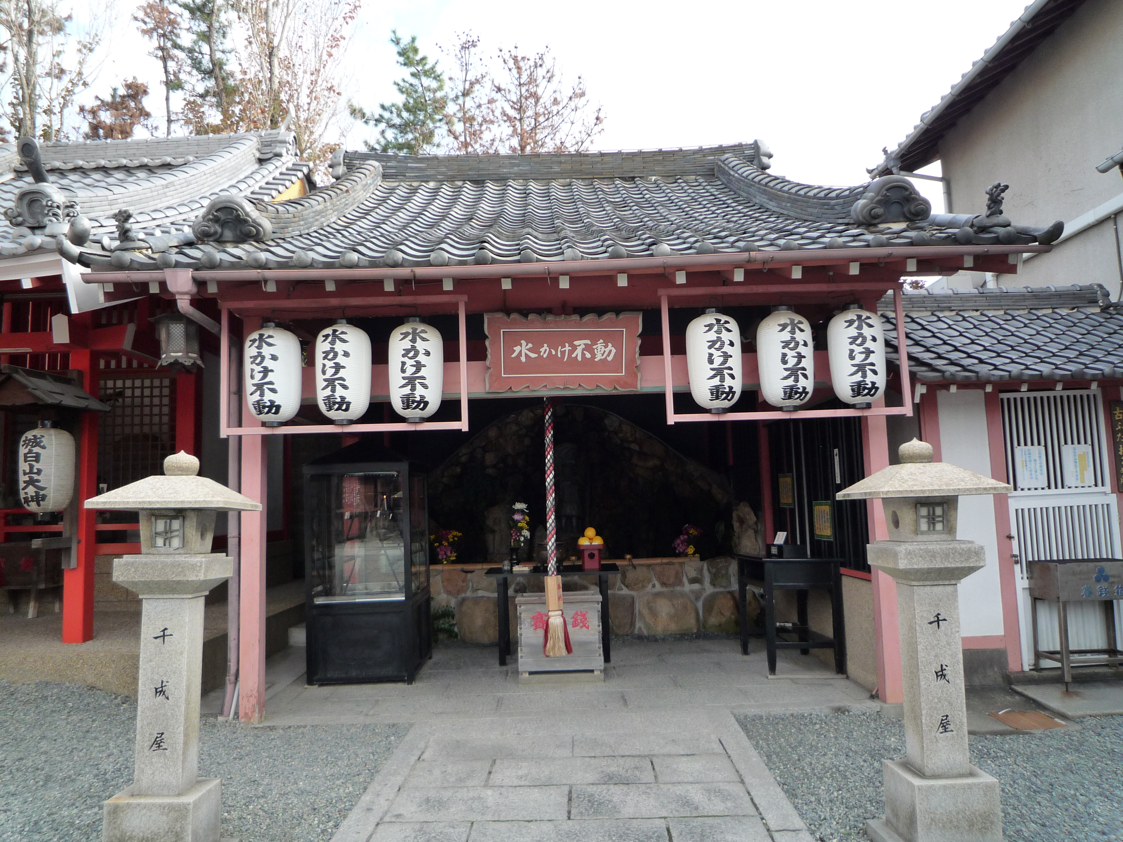 豊中不動尊 水かけ不動